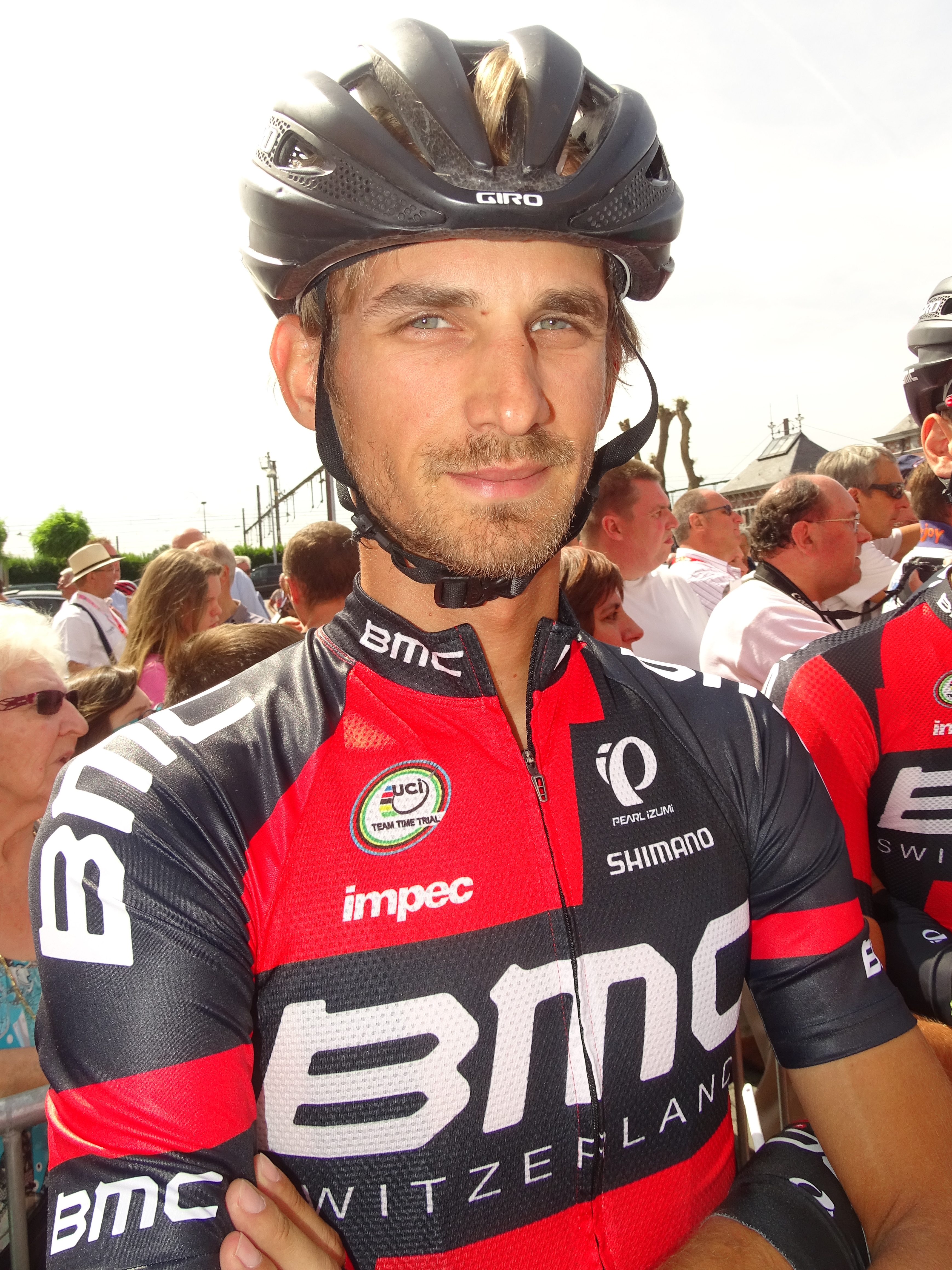 Reportage réalisé le mercredi 22 juillet à l'occasion du départ du Grand Prix Pino Cerami 2015 à Saint-Ghislain, Belgique.